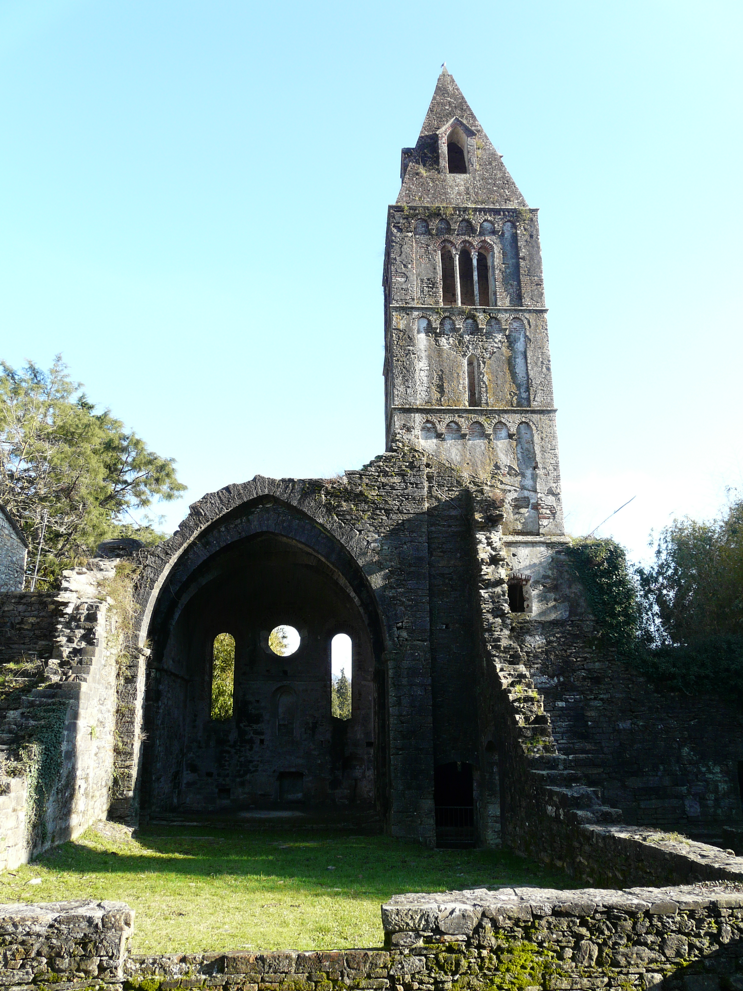 Ruderi dell'antico complesso monastico di Valle Christi del XIII secolo presso Rapallo, Liguria, Italia